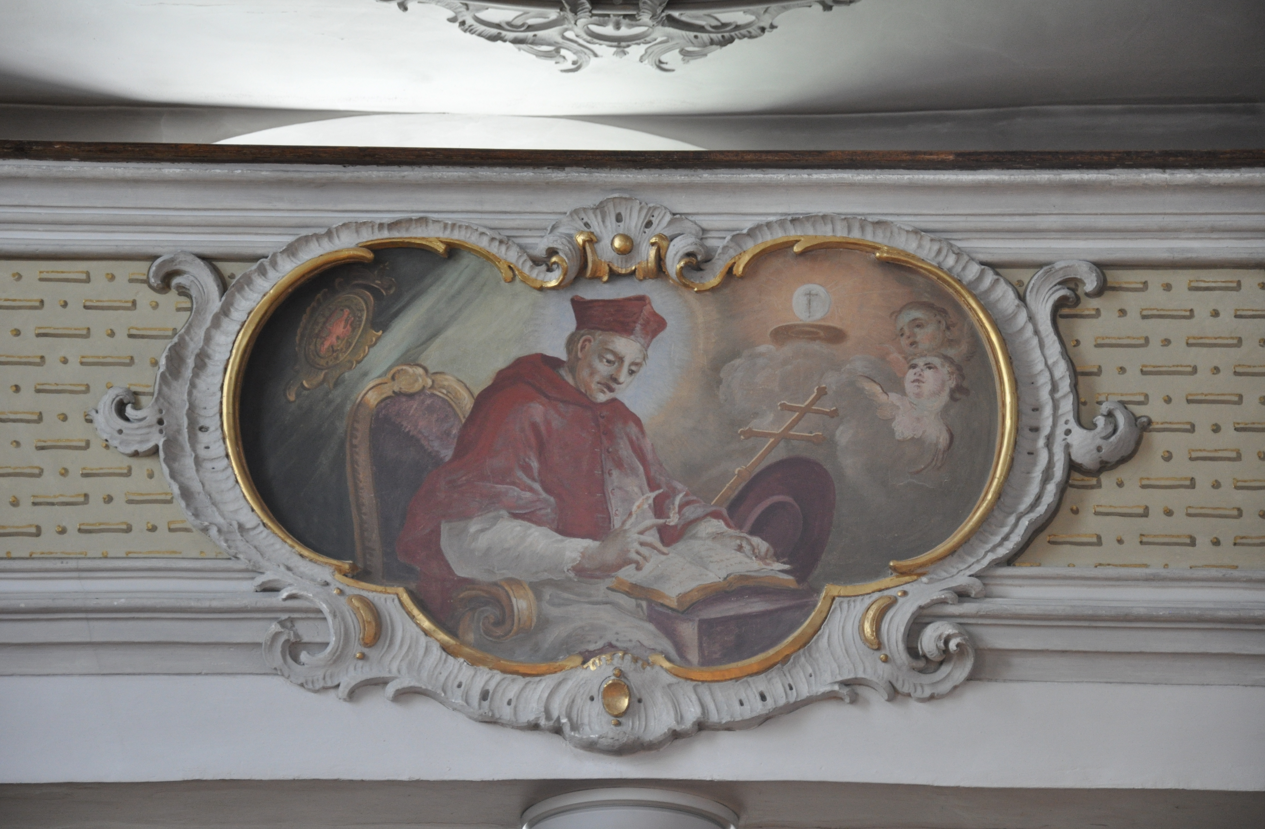 Meßkirch, Pfarrkirche St. Martin, Konrad von Urach